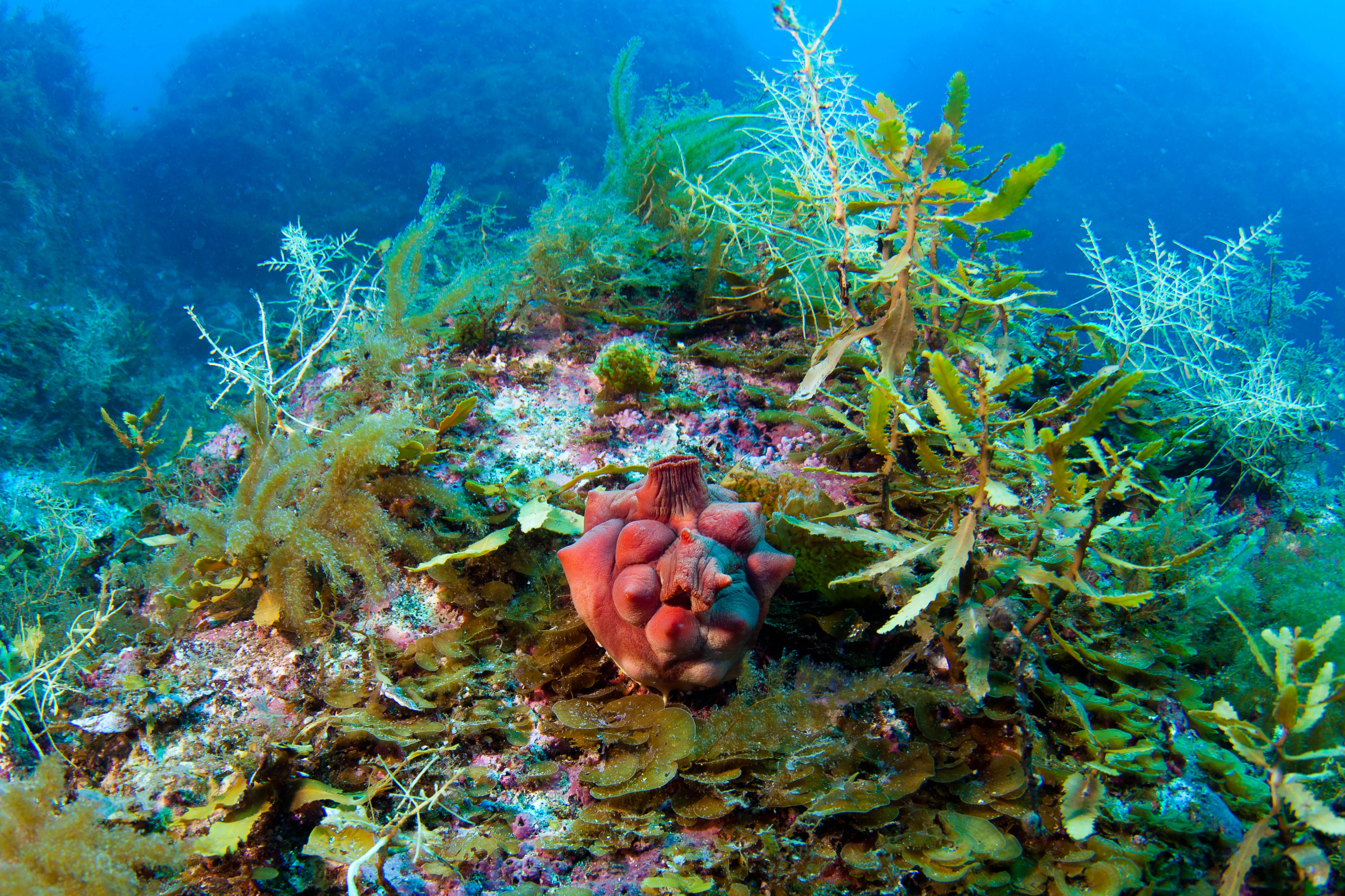 Sea squirt aka マボヤ